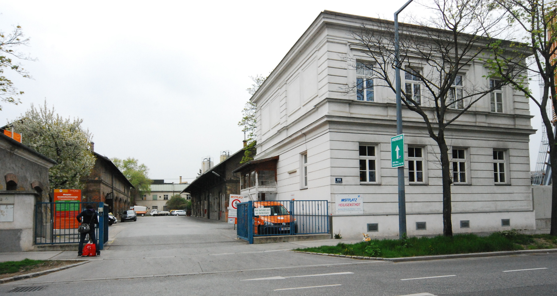 ehemaliges städtisches Schlachthaus Nussdorf in der Grinzinger Straße 151 in Wien-Döbling, heute Standort der MA 48 (Mistplatz Heiligenstadt)